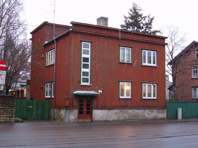 Puitelamu. Tondi 3. Muinsuskaitse alune hoone.